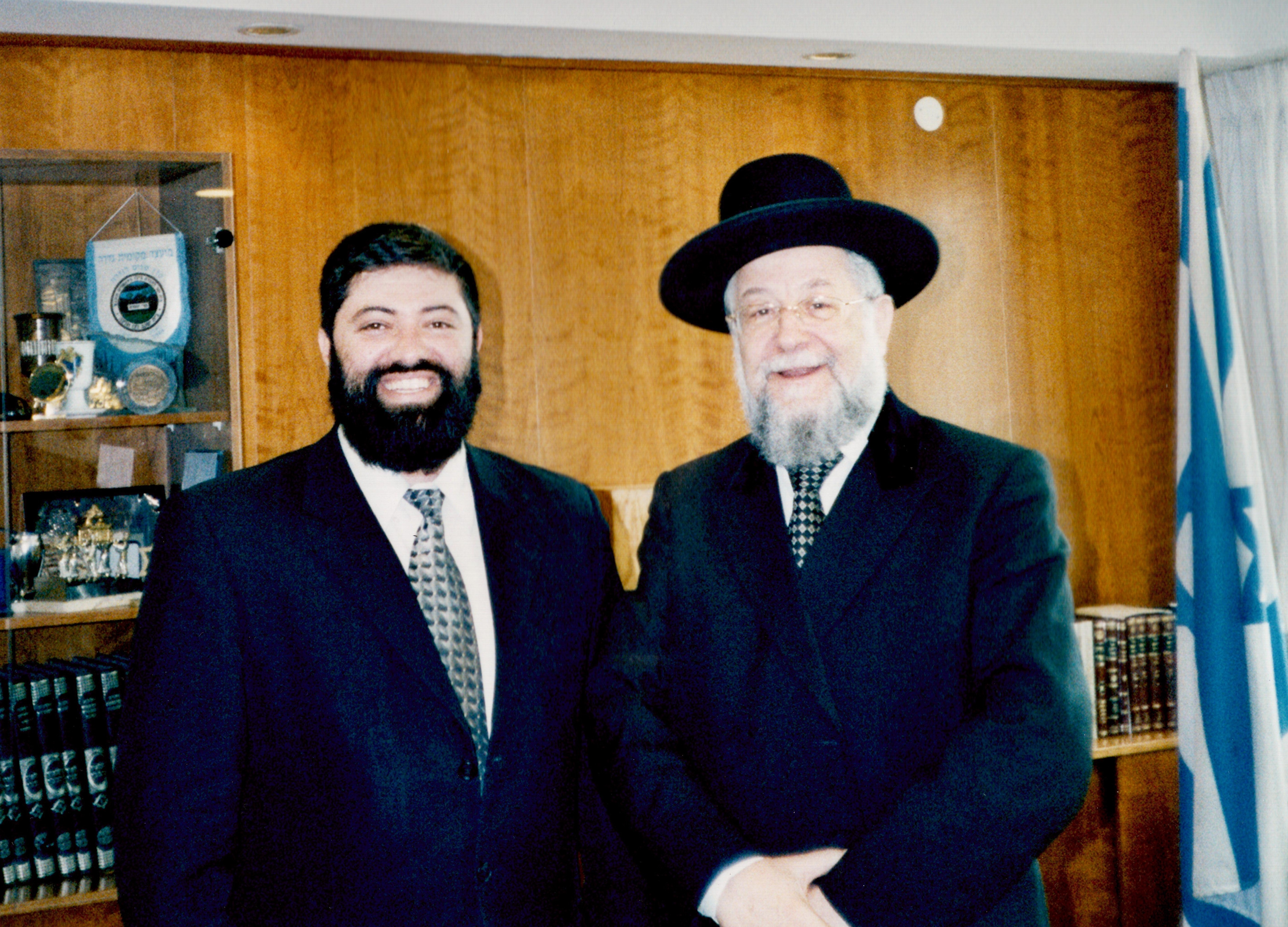 הרב עמוס שושן והרב ישראל מאיר לאו